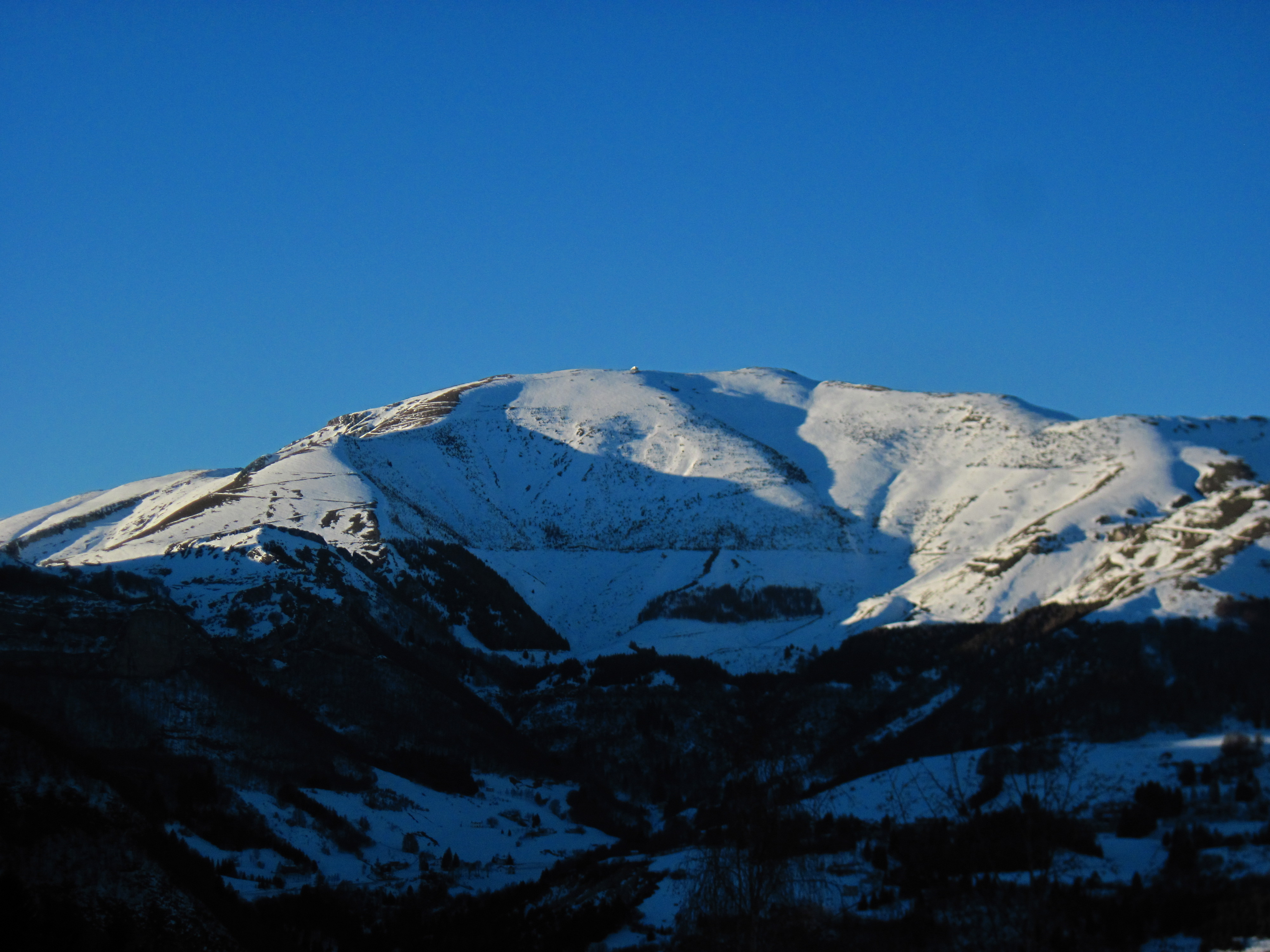 vista invernale del monte Altissimo di Nago